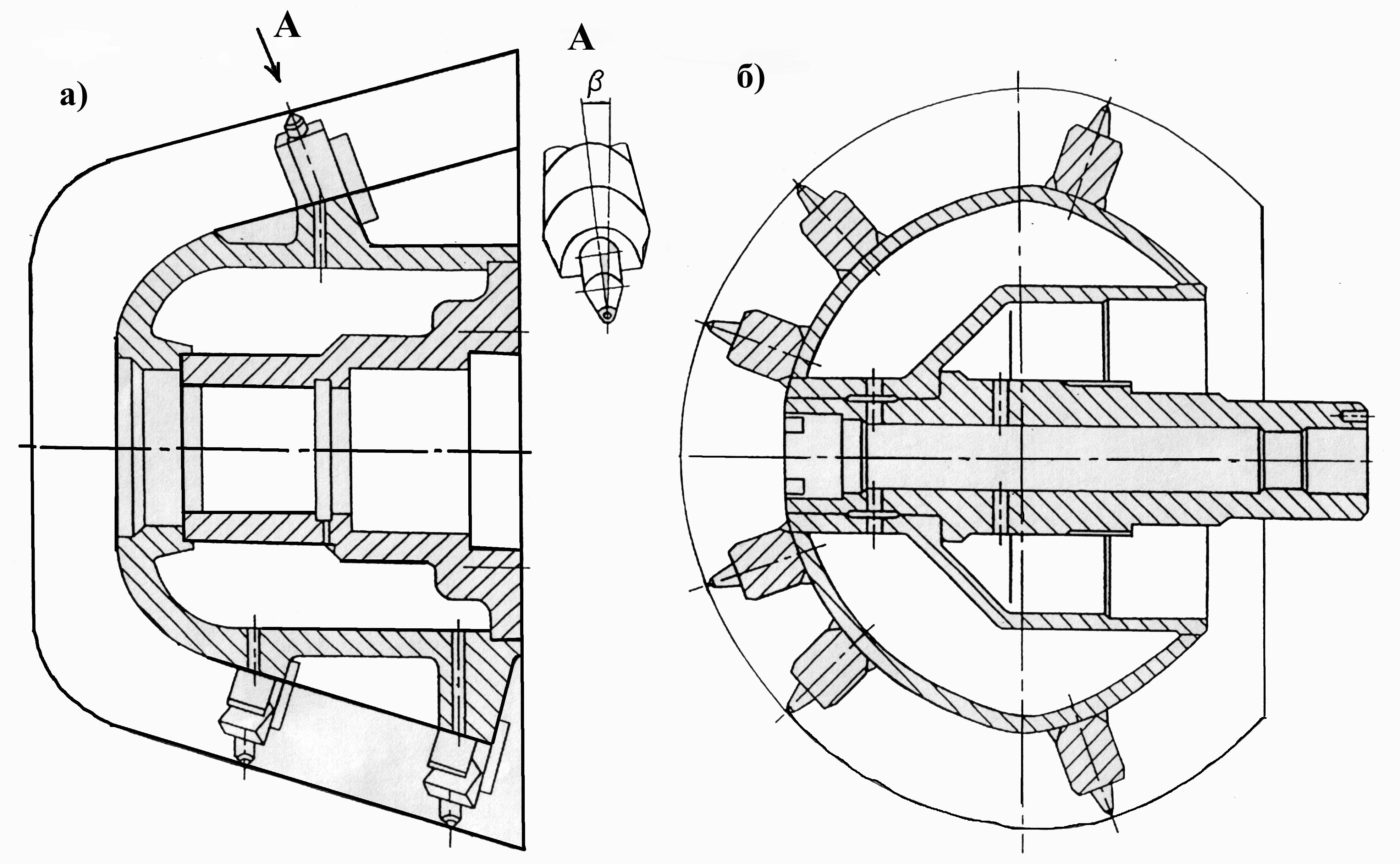 Схема